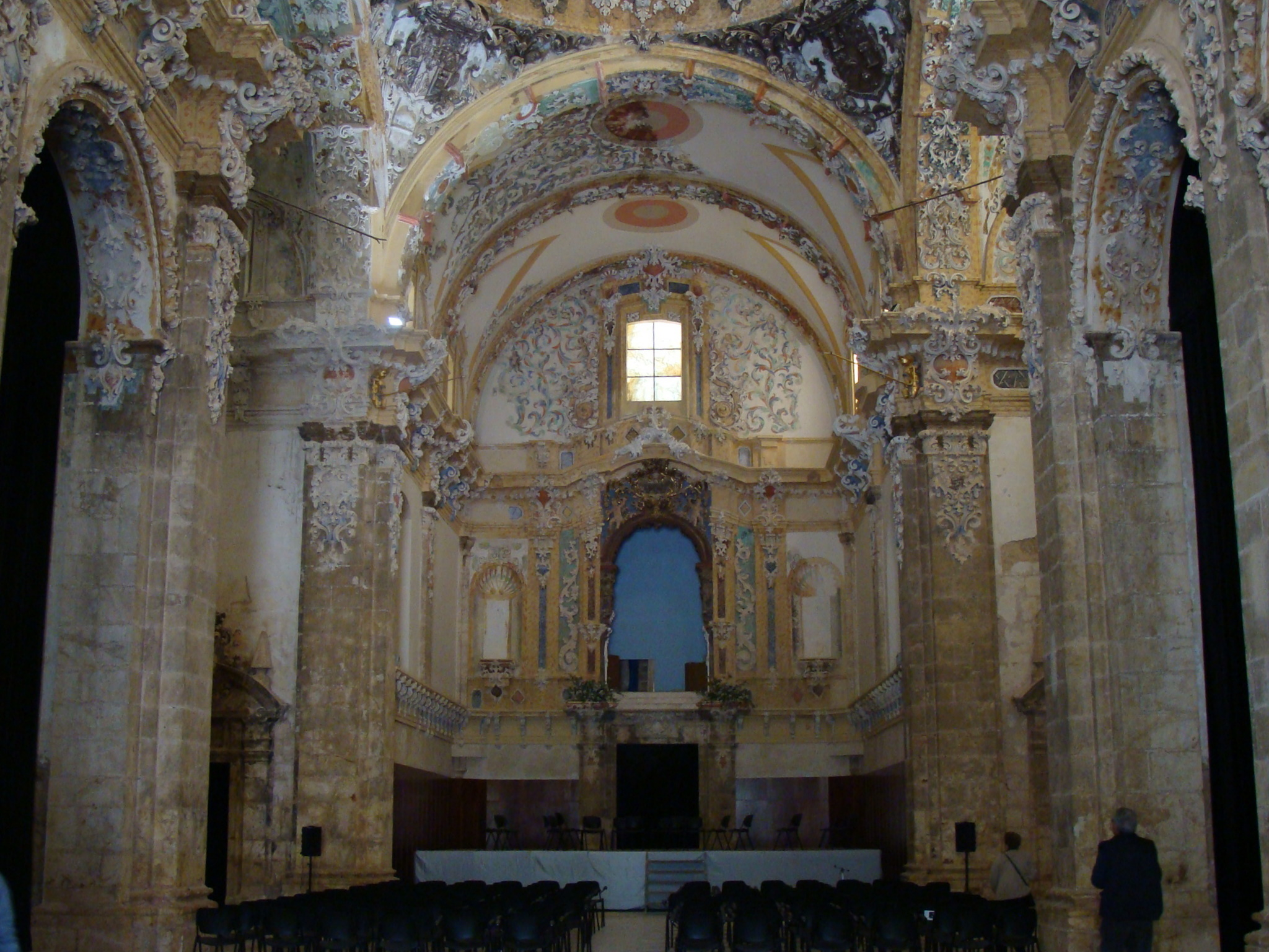 Interior del templo de Santa María en Simat de la Valldigna (Valencia), en restauración